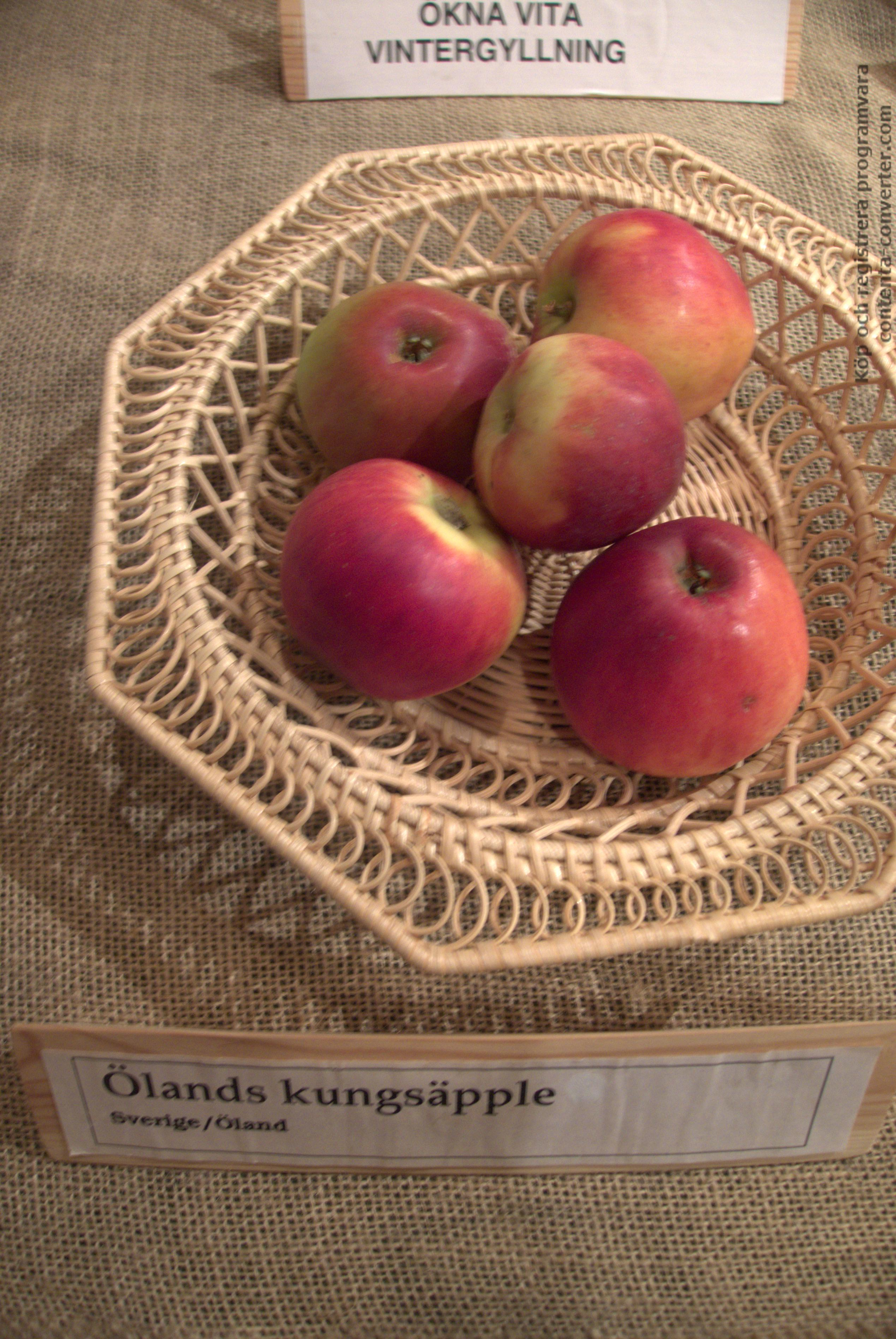 Äpplen av sorten Ölands kungsäpple